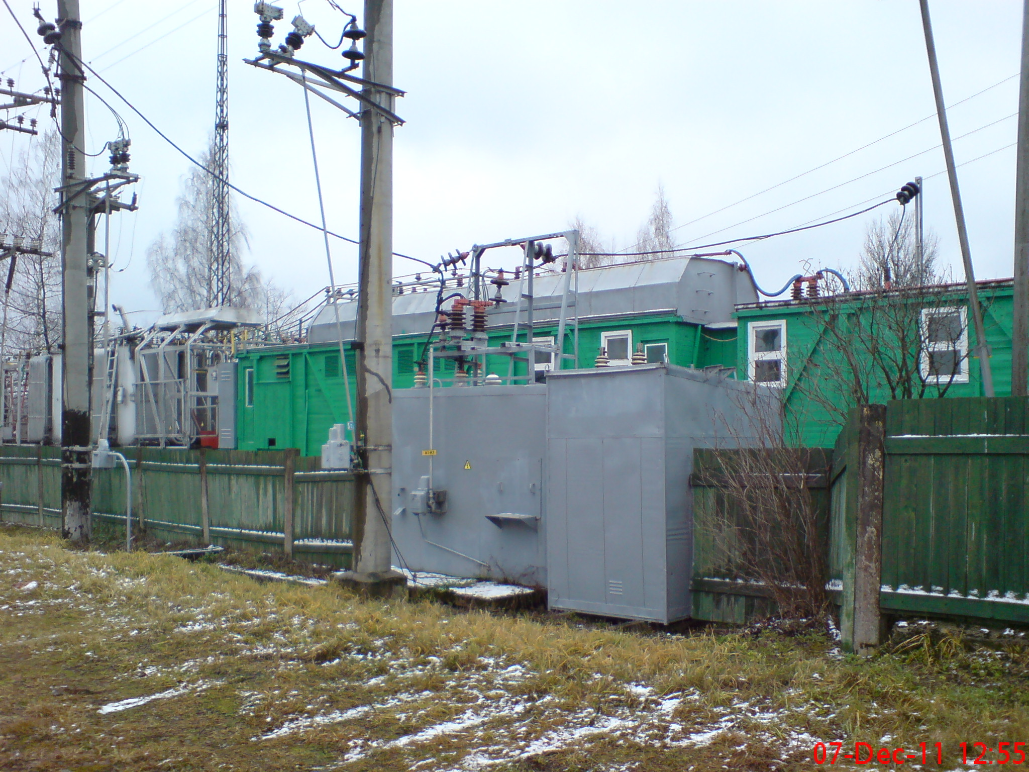 Vilces apakšstacija